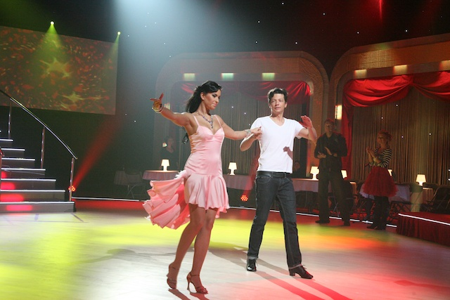 Tantsud tähtedega